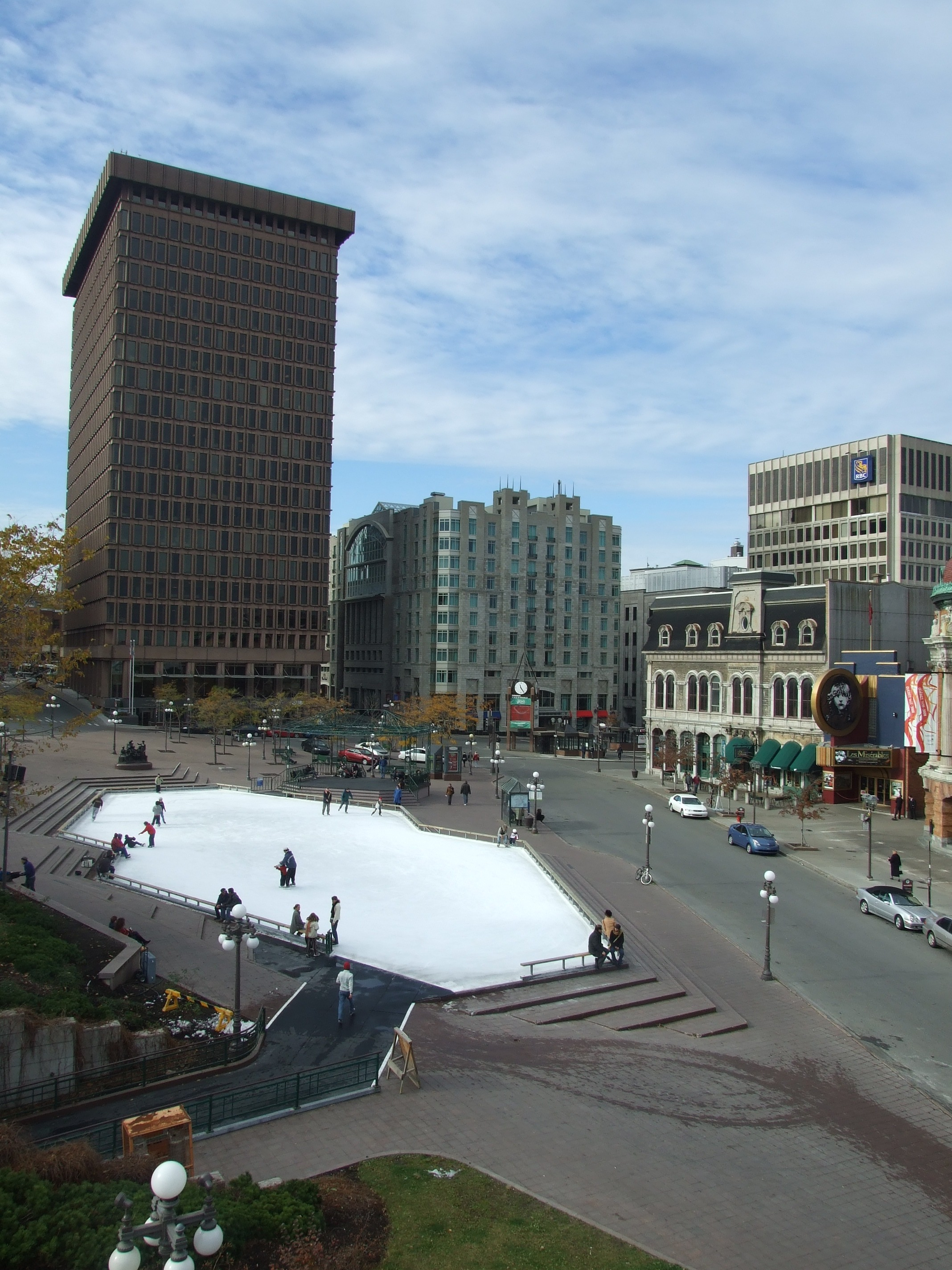 Le Carré d'Youville et son anneau de glace au centre-ville de Québec